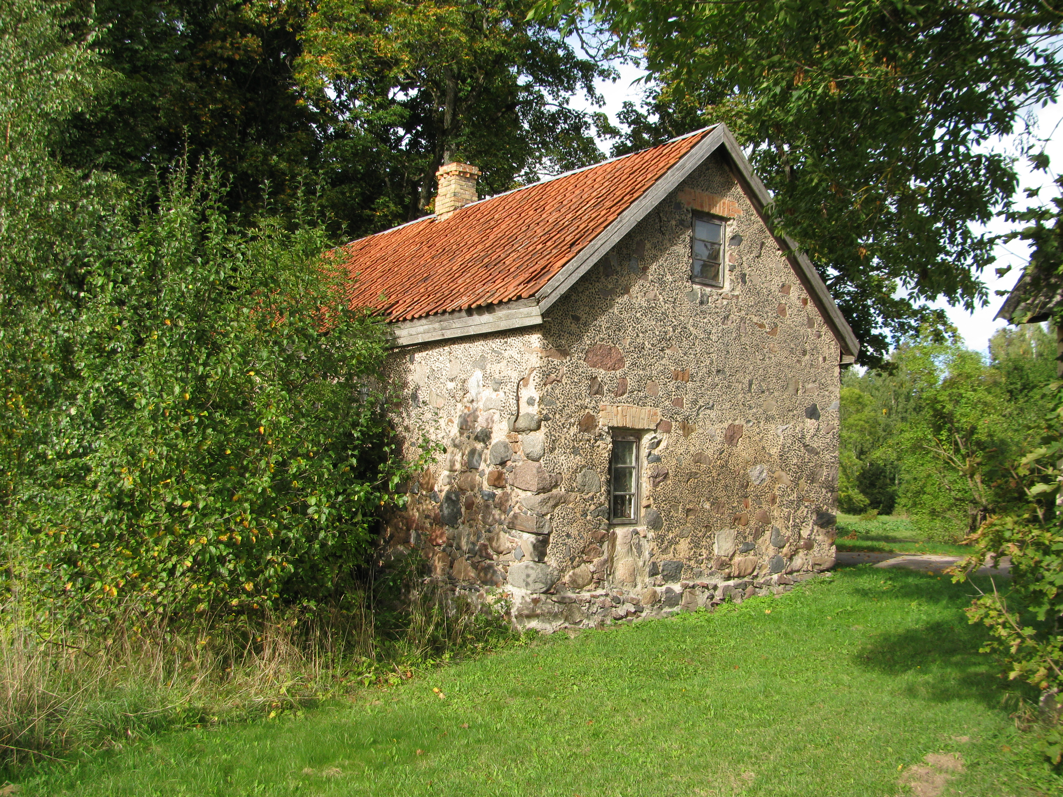 Bramberģes muižas apbūve ar parku, Bramberģe